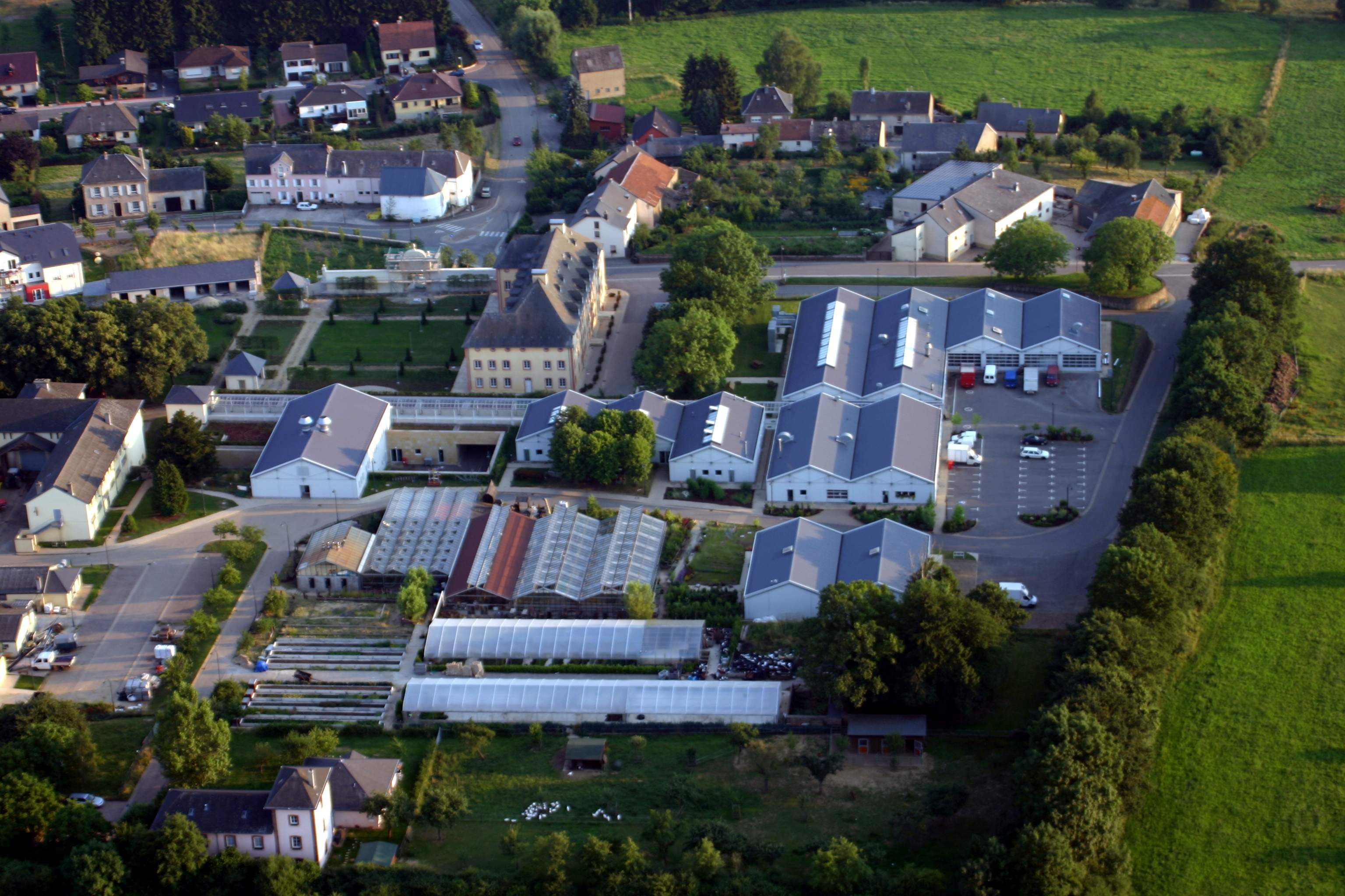 Betten op der Mess aalt Klouschter an nei Amlagen